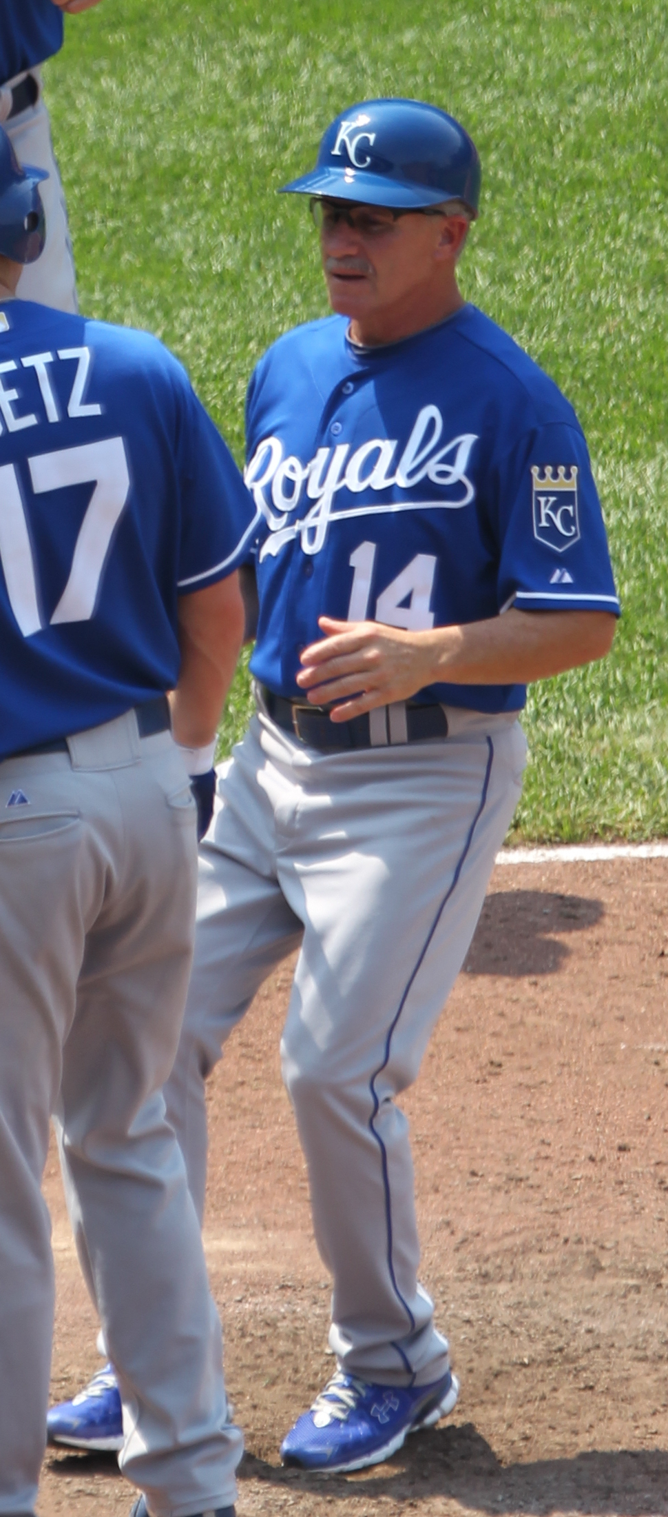 Eddie Rodriguez